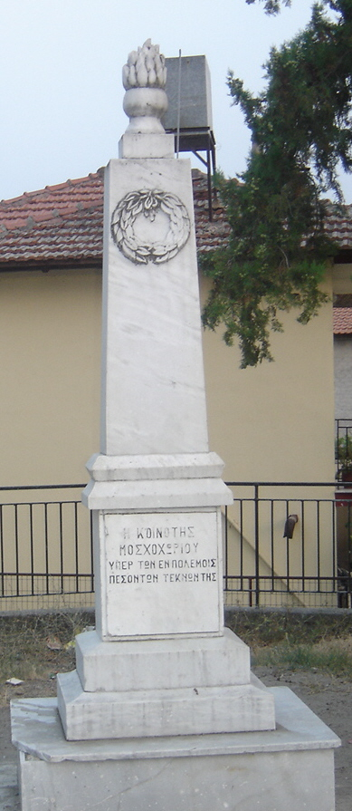 Memorial plaque at Moschochori, Pieria.